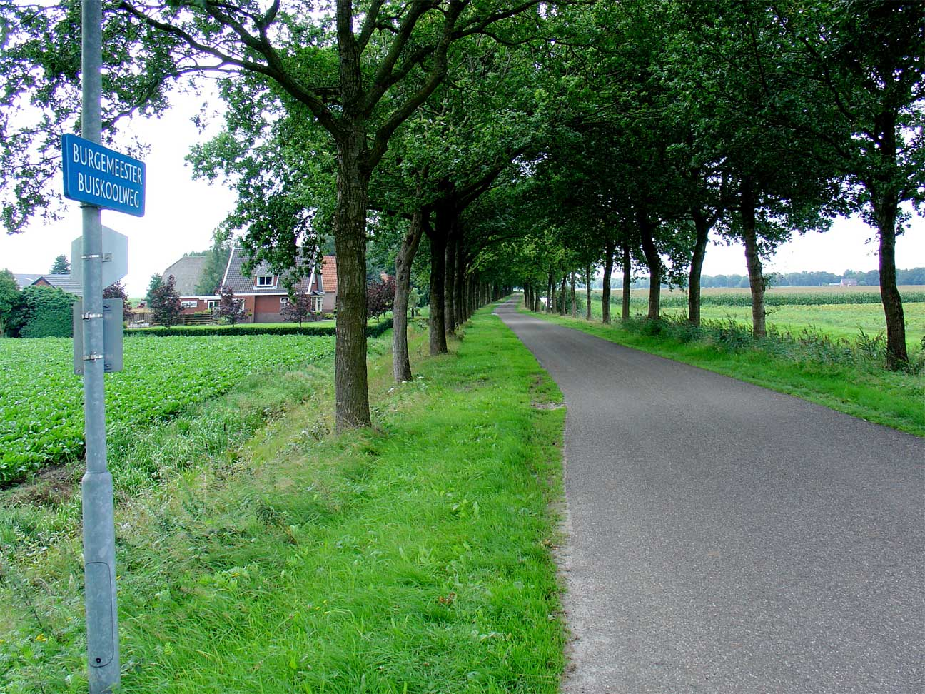 Burgemeester Buiskoolweg in Over de Dijkl